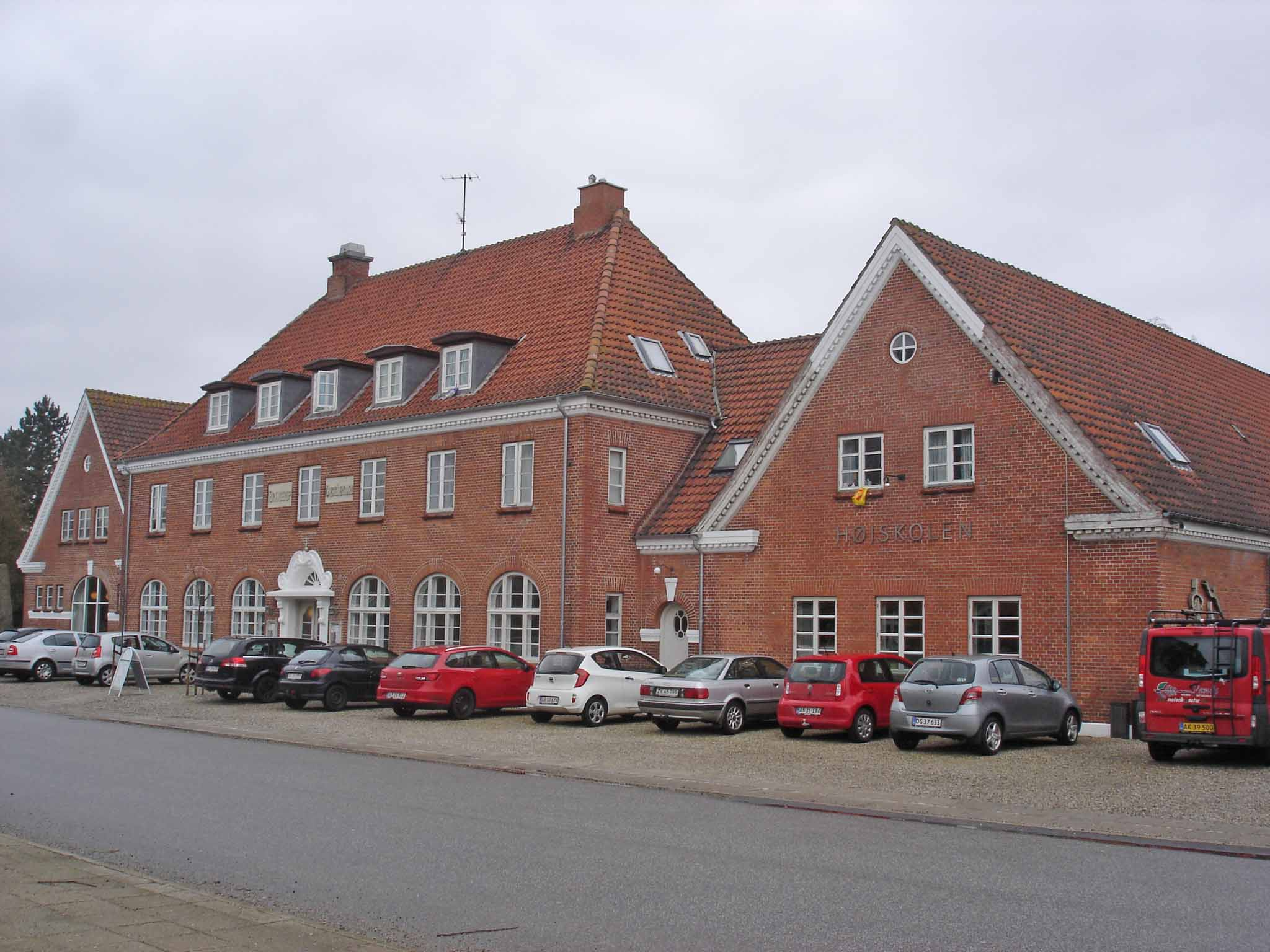 Brenderup Højskole fra SØ